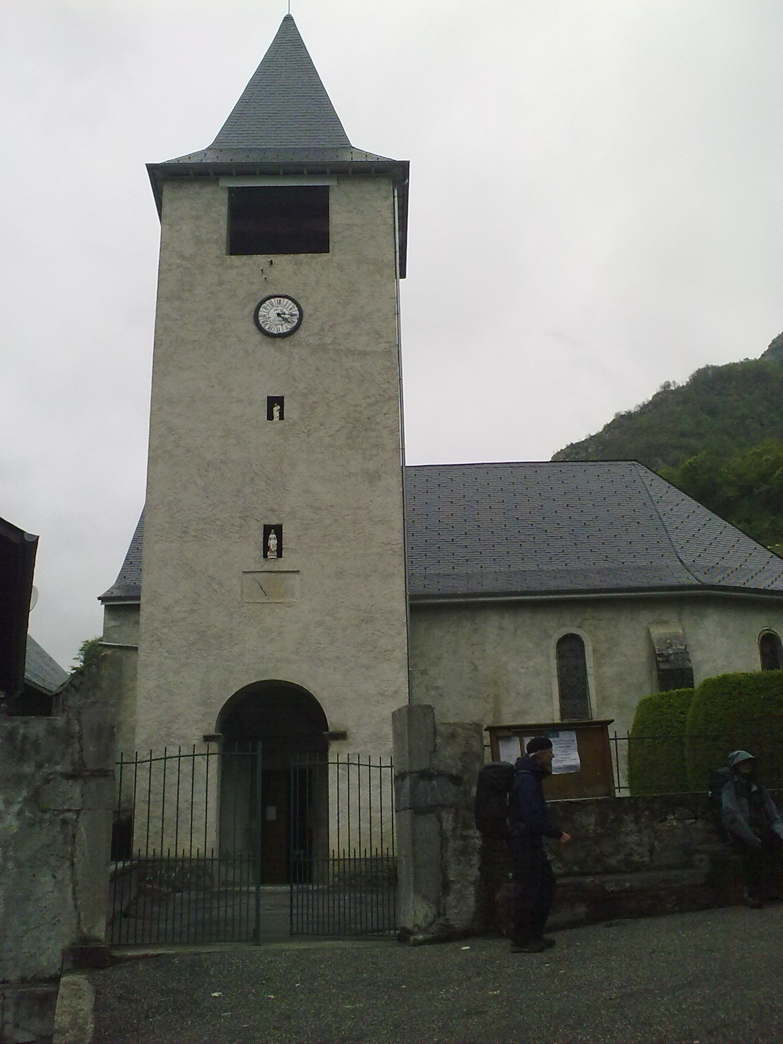 Etsaut, France